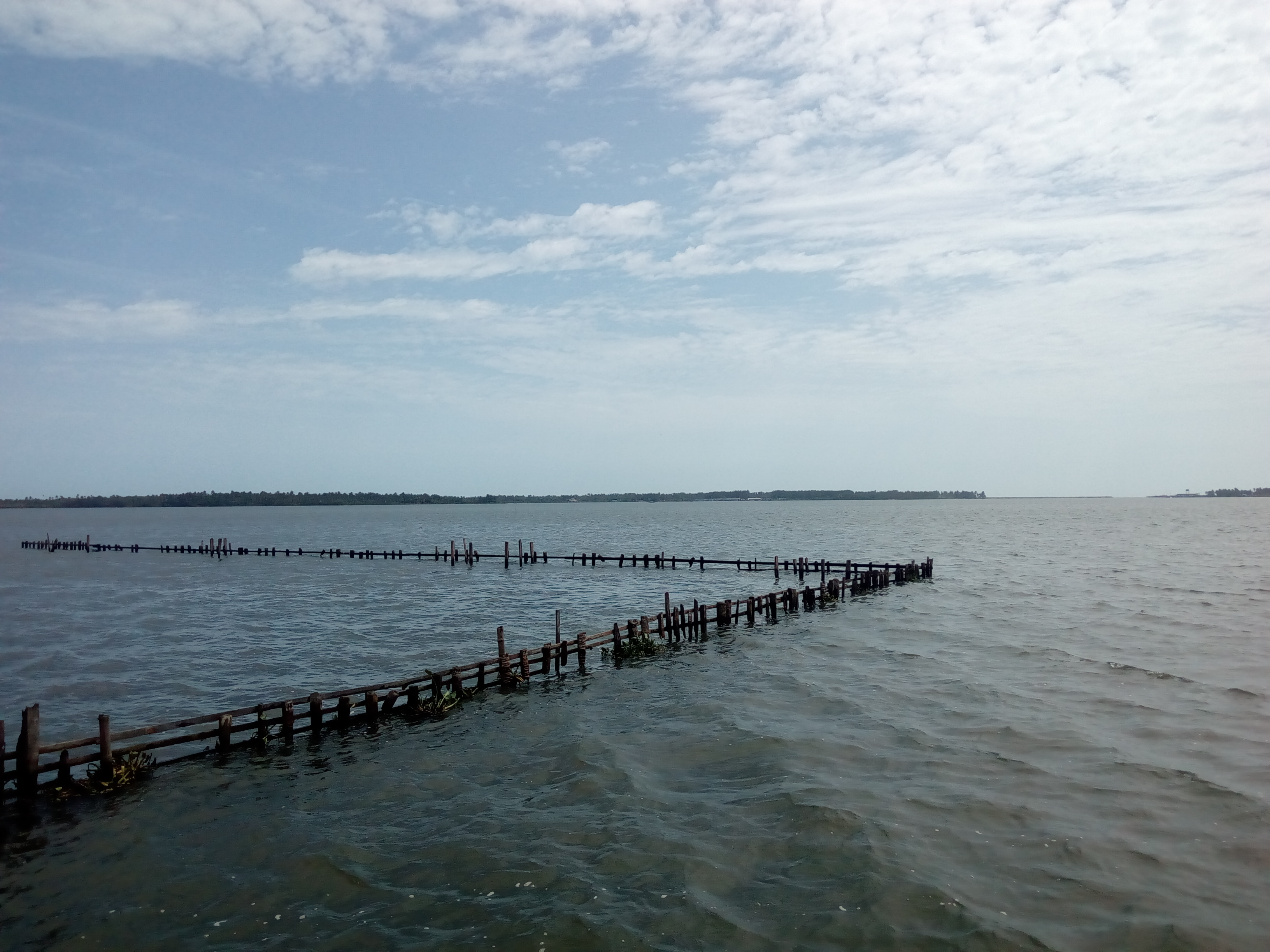 Kayamkulam Kayal